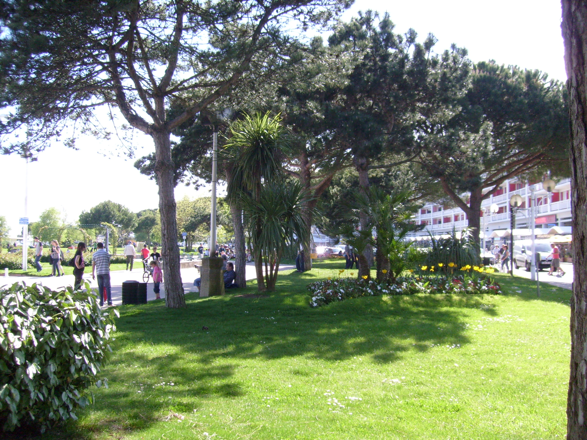 photographie de Cobber17